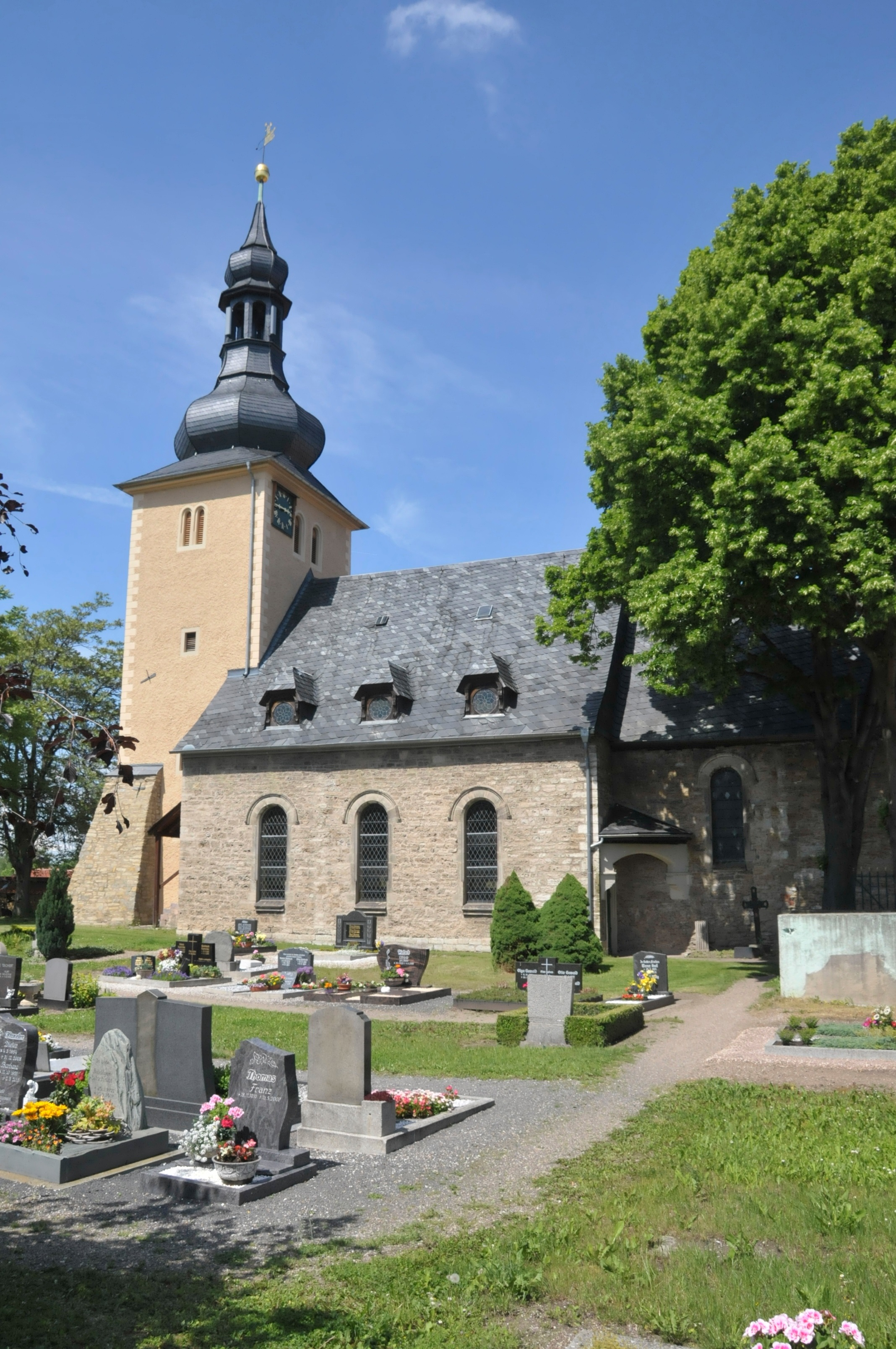 Orlishausen, Heilandskirche